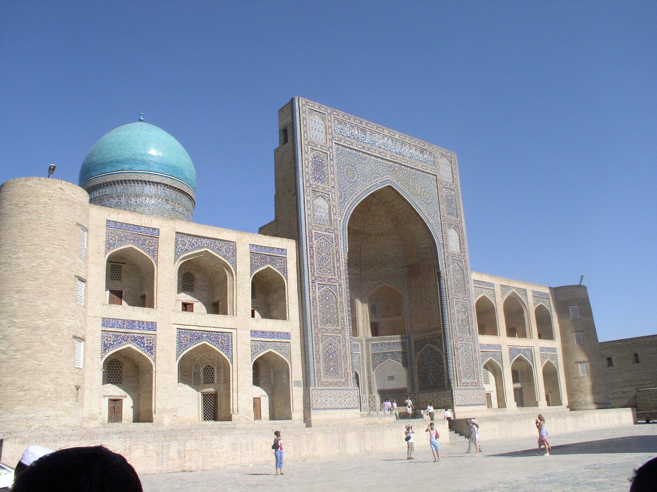 Mir-i Arab madrasah in Bukhara, Uzbekistan